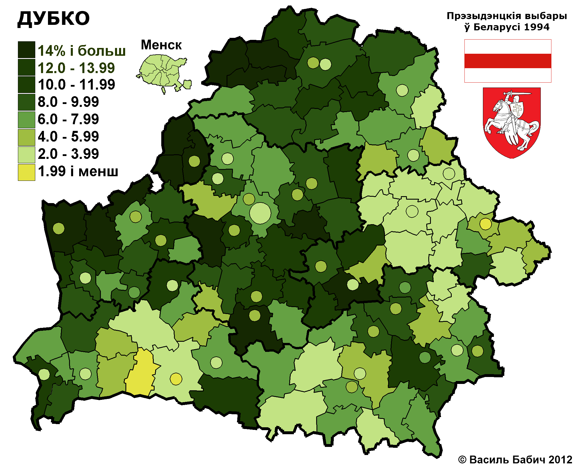 Мапа підтримки Олександра Дубка (1994) на виборах Президента Білорусі Беларуская (тарашкевіца): Мапа падтрымкі Аляксандра Дубко на выбарах прэзыдэнта Беларусі 1994.